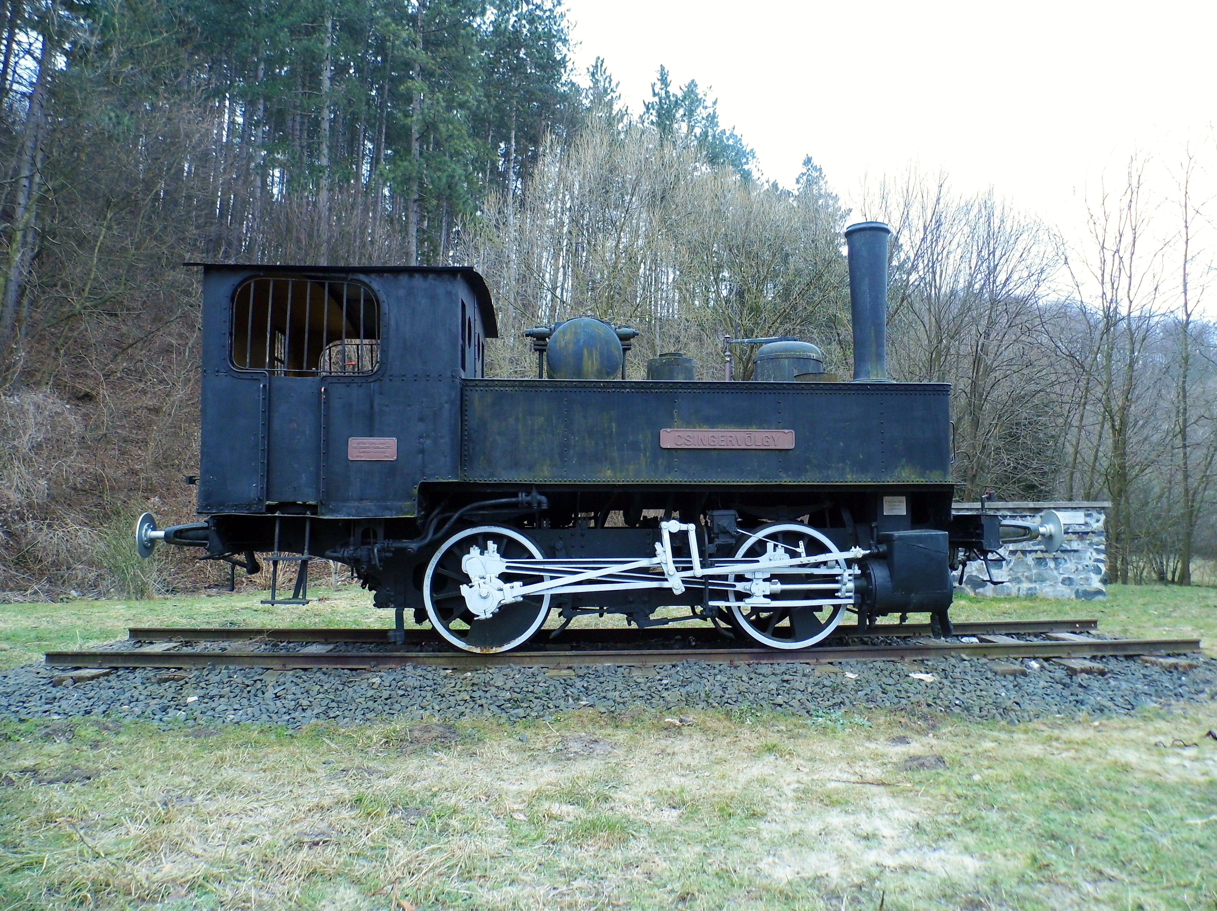 A kiállított Csingervölgy gőzmozdony Csingervölgyben